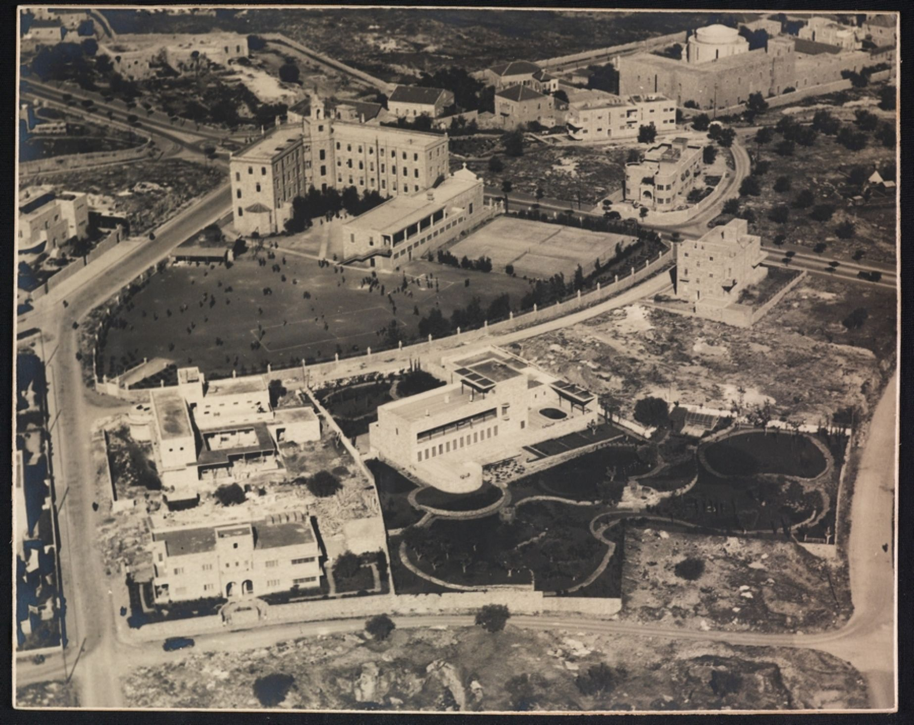 תצלום אוויר ירושלים בית אגיון